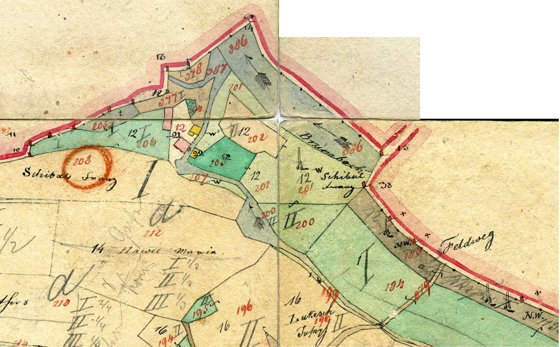 Detail nejstarší katastrální mapy Bražné z roku 1839 - Chadimův mlýn